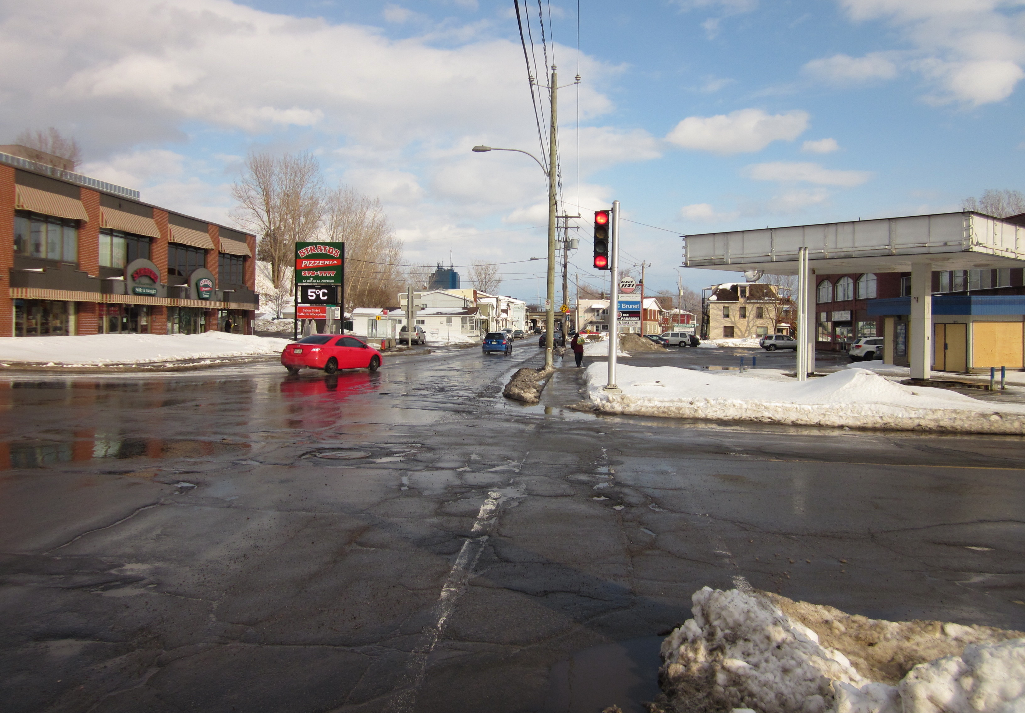 Coin des rue Sainte-Marguerite et de la côte Plouffe à Trois-Rivières en 2011, site présumé de la bataille de Trois-Rivières